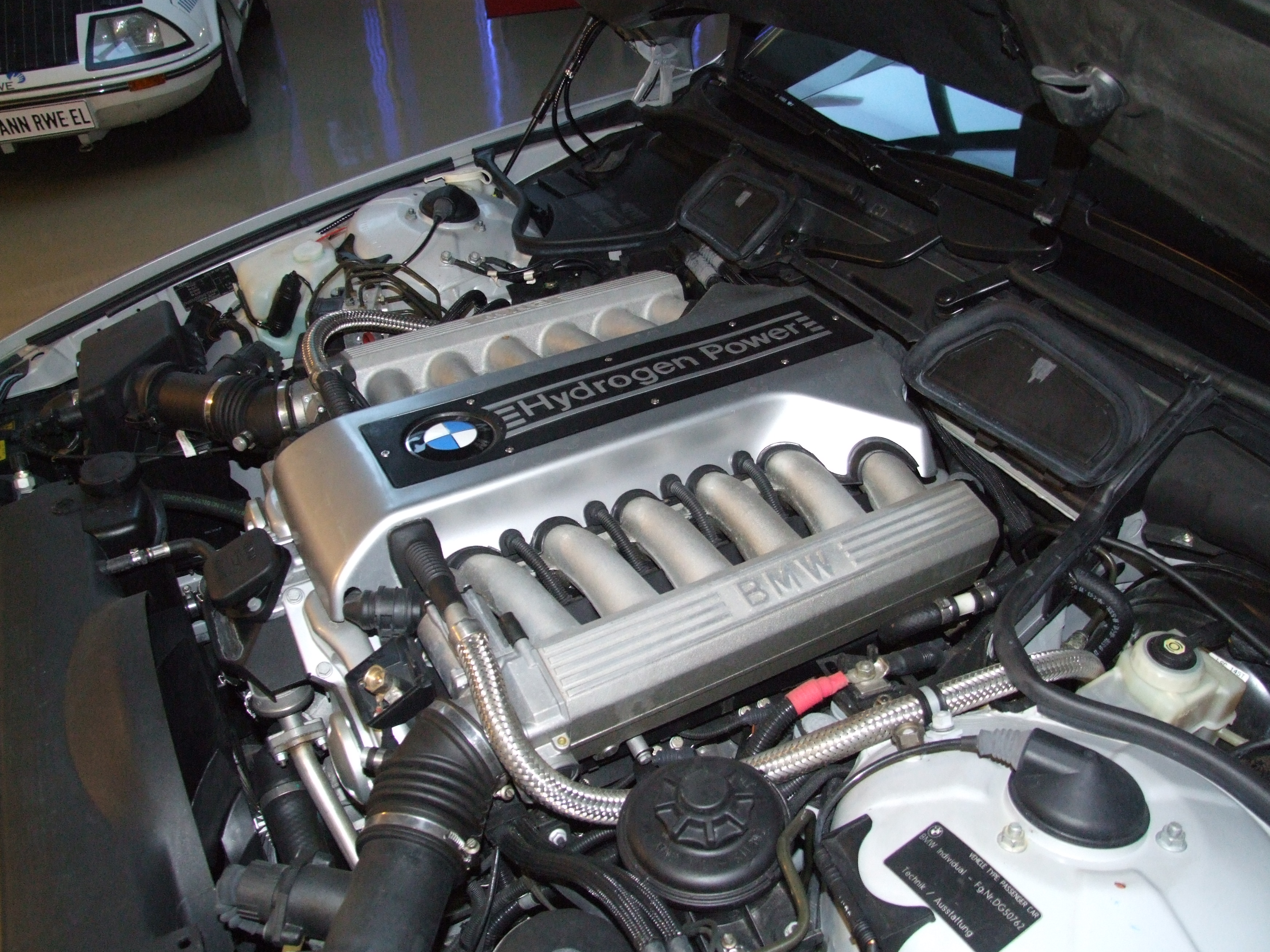 12-Zylinder-Wasserstoffmotor des BMW 750hL, Baujahr 2001 Museum Autovision, Altlußheim, Germany; genauere Angaben: BMW 750hl, Verbrauch: 20 l Benzin oder 40 l H2 /100km; max 226 km/h, Reichweite: 350 km mit H2, 600 km mit Benzin, Laufleistung: 170.000 km